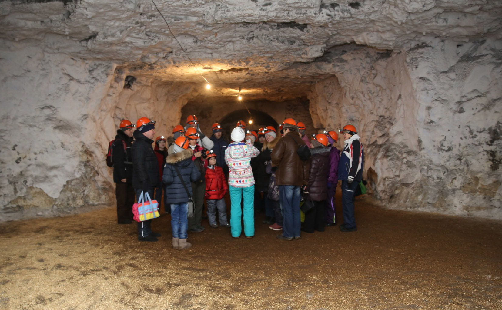 Зал в горном холодильнике "Красная Глинка"